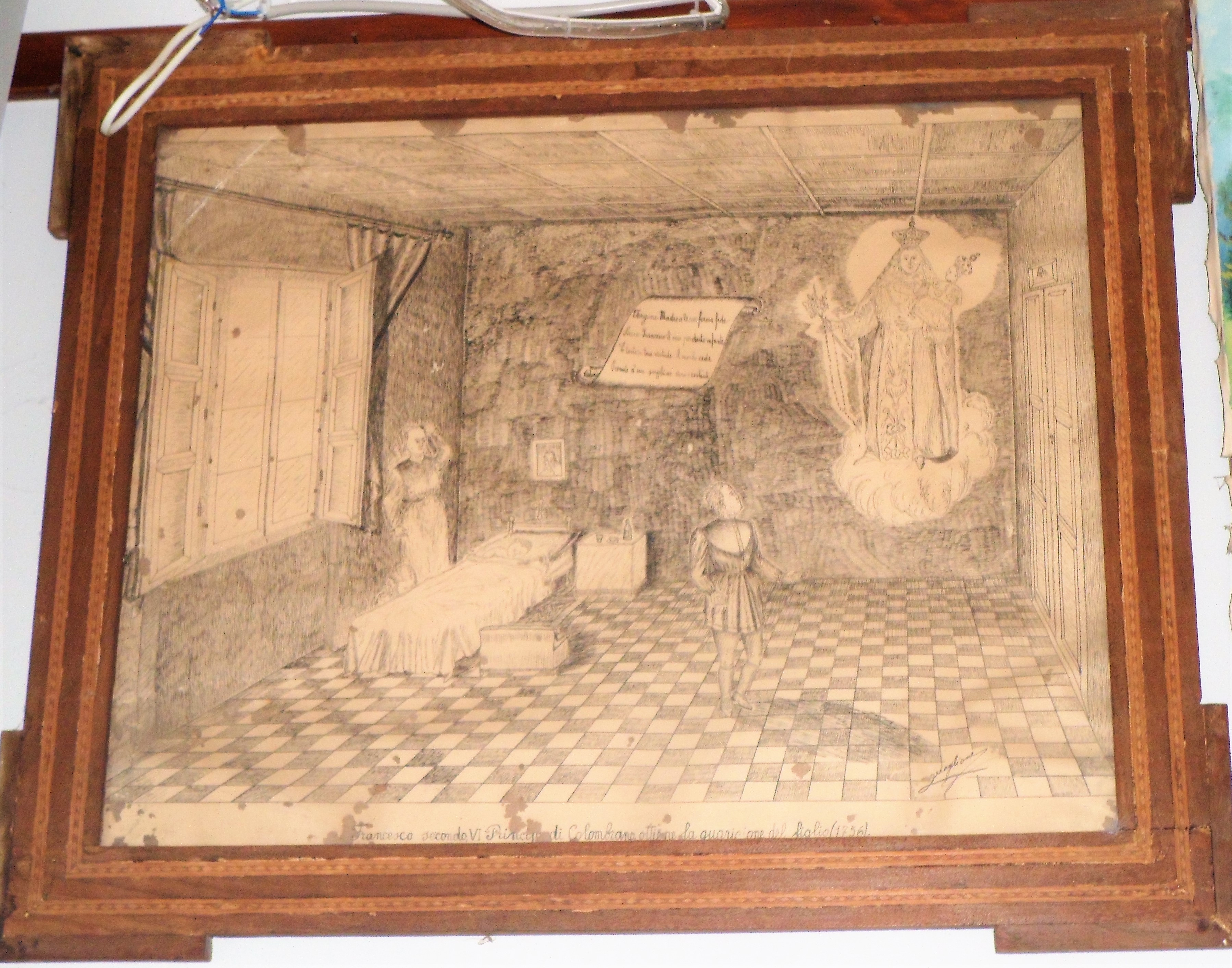 Quadro in carboncino che rappresenta la guarigione,per miracolo della Madonna, del figlio di Francesco II Carafa nel 1756